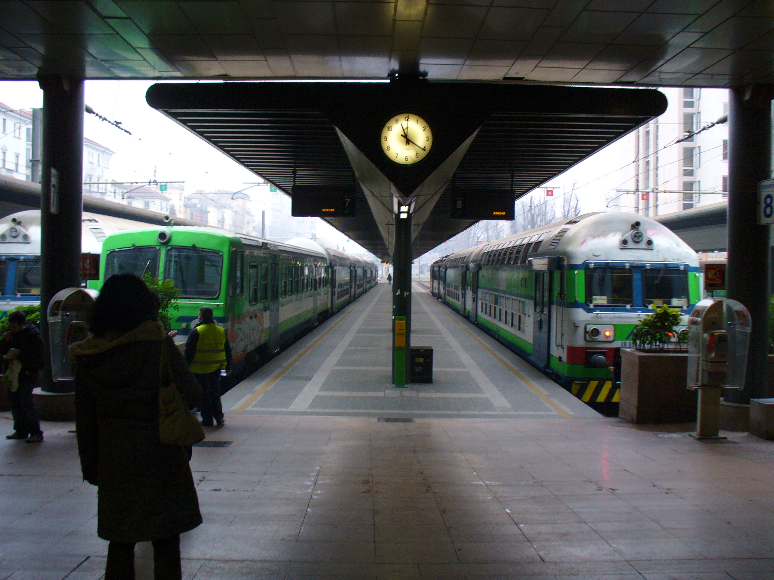 Stazione ferroviaria di Milano Cadorna